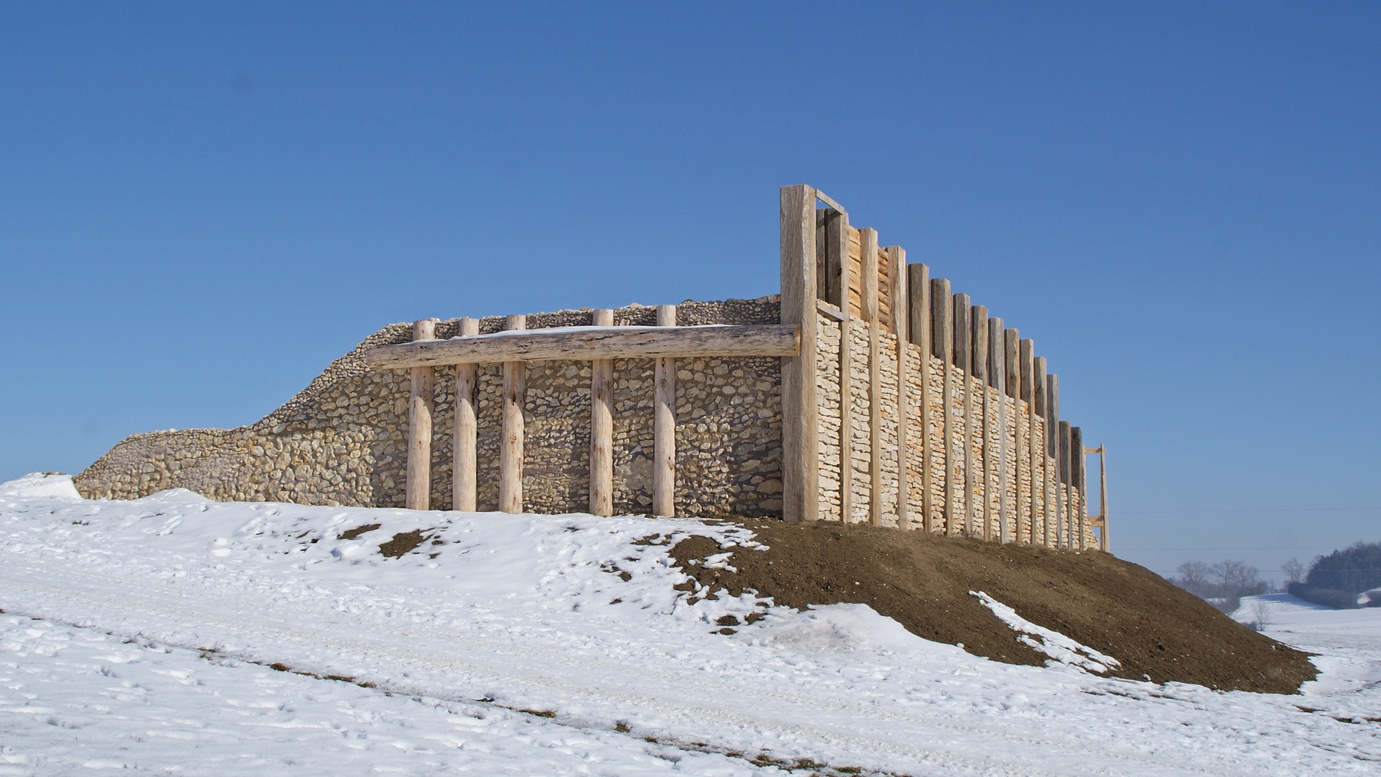 Rekonstruierte Pfostenschlizmauer am Ipf bei Bopfingen